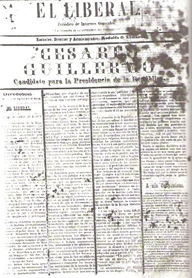 El liberal